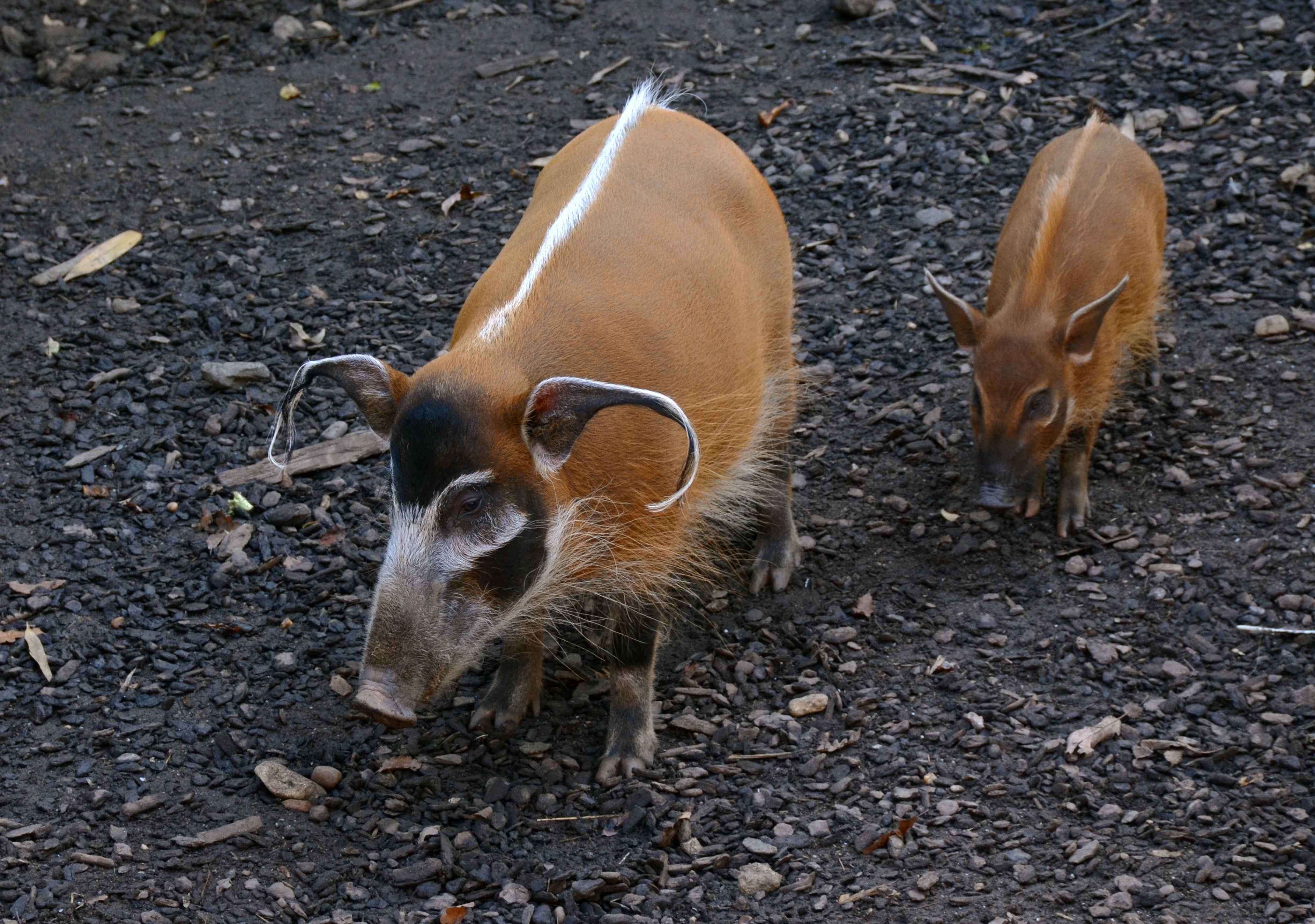 Potamochères ( Potamochoerus porcus ) au zoo d'Amnéville.